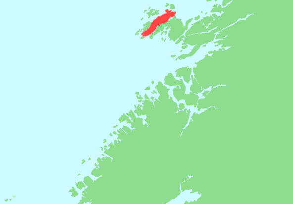 Locator map of Ytter-Vikna, Nord-Trøndelag, Norway